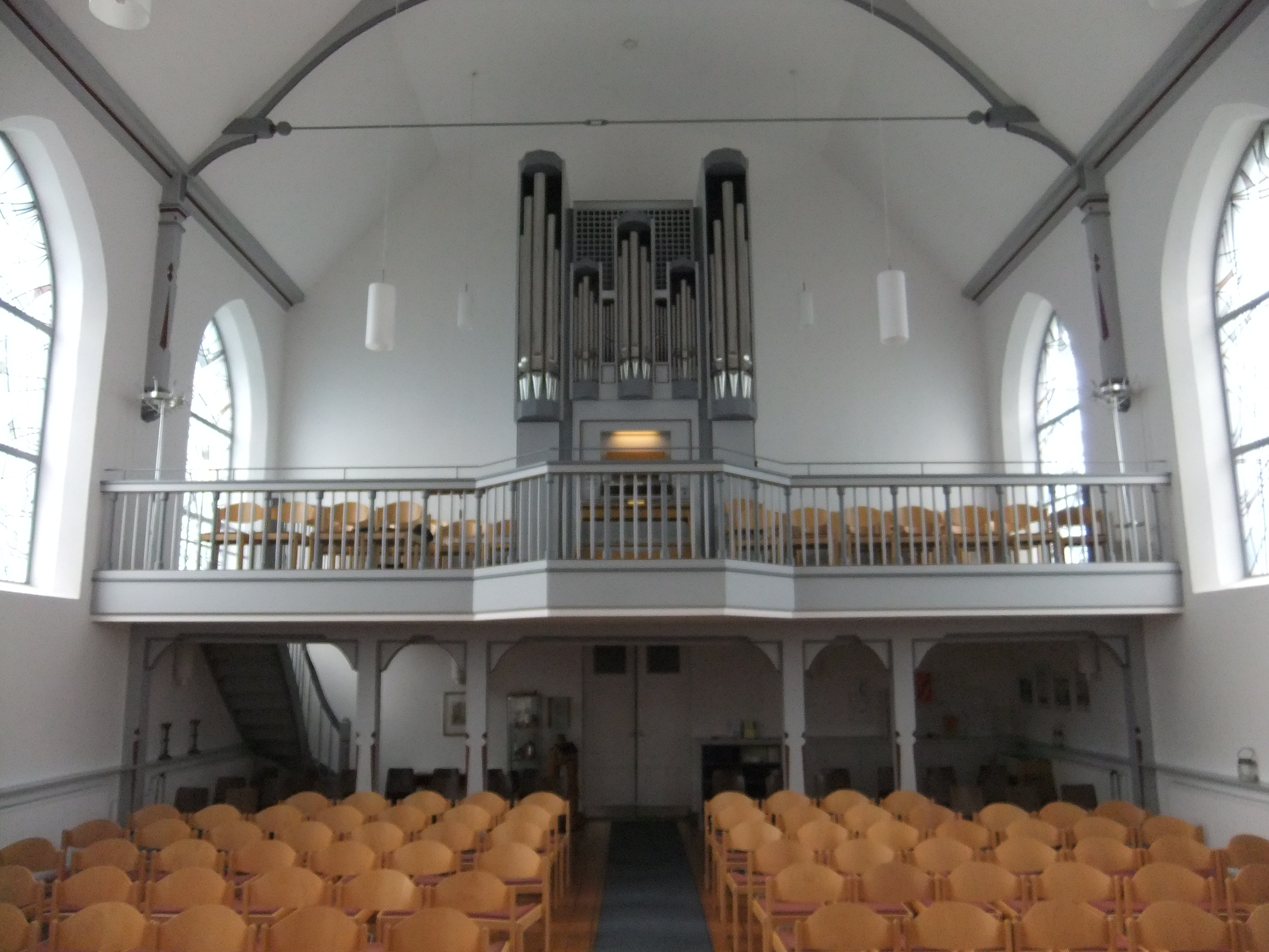 Ansichten der Evangelischen Kirche im Wuppertaler Ortsteil Laaken